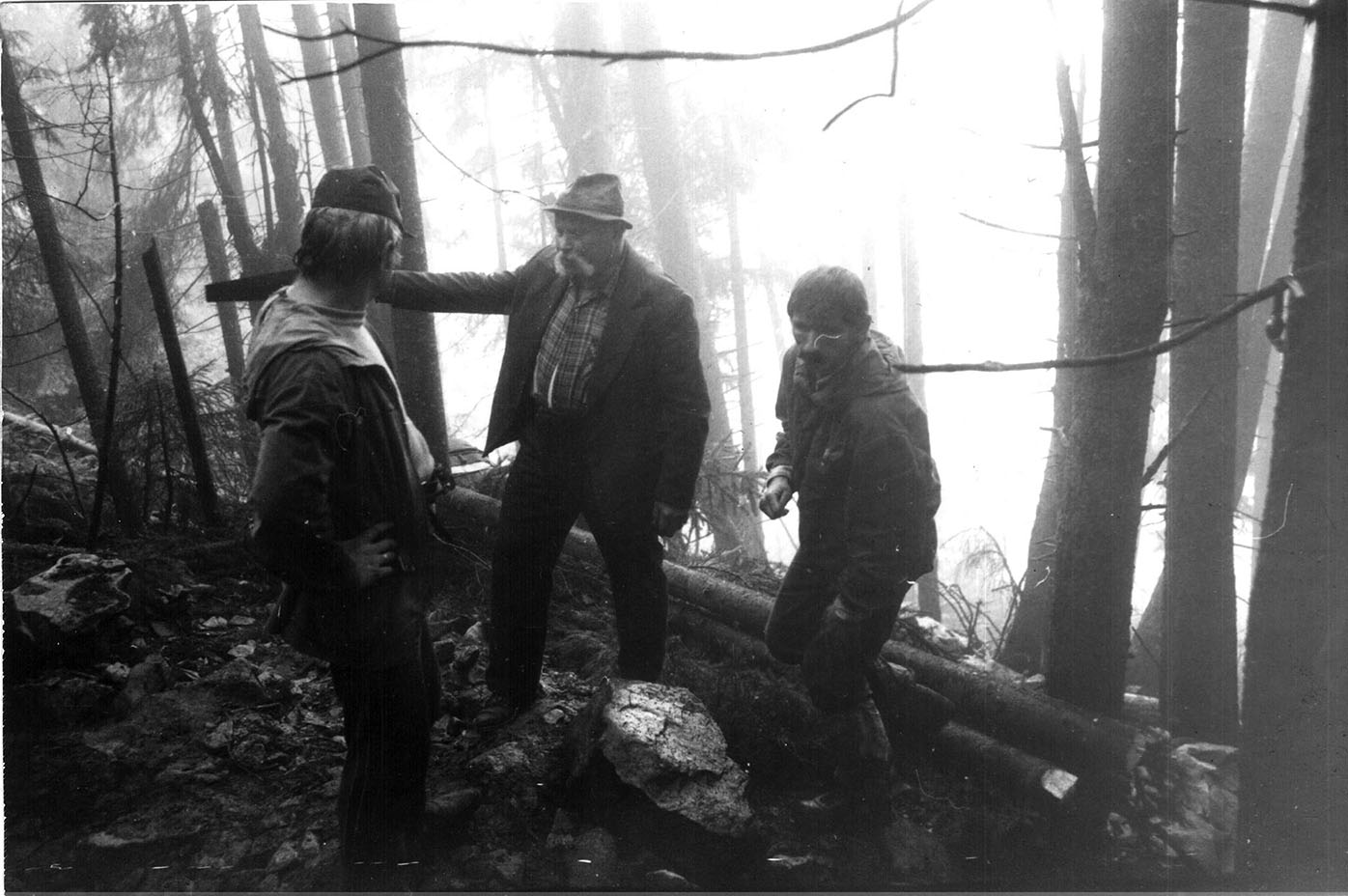 Михайло Зеленчук на розкопках